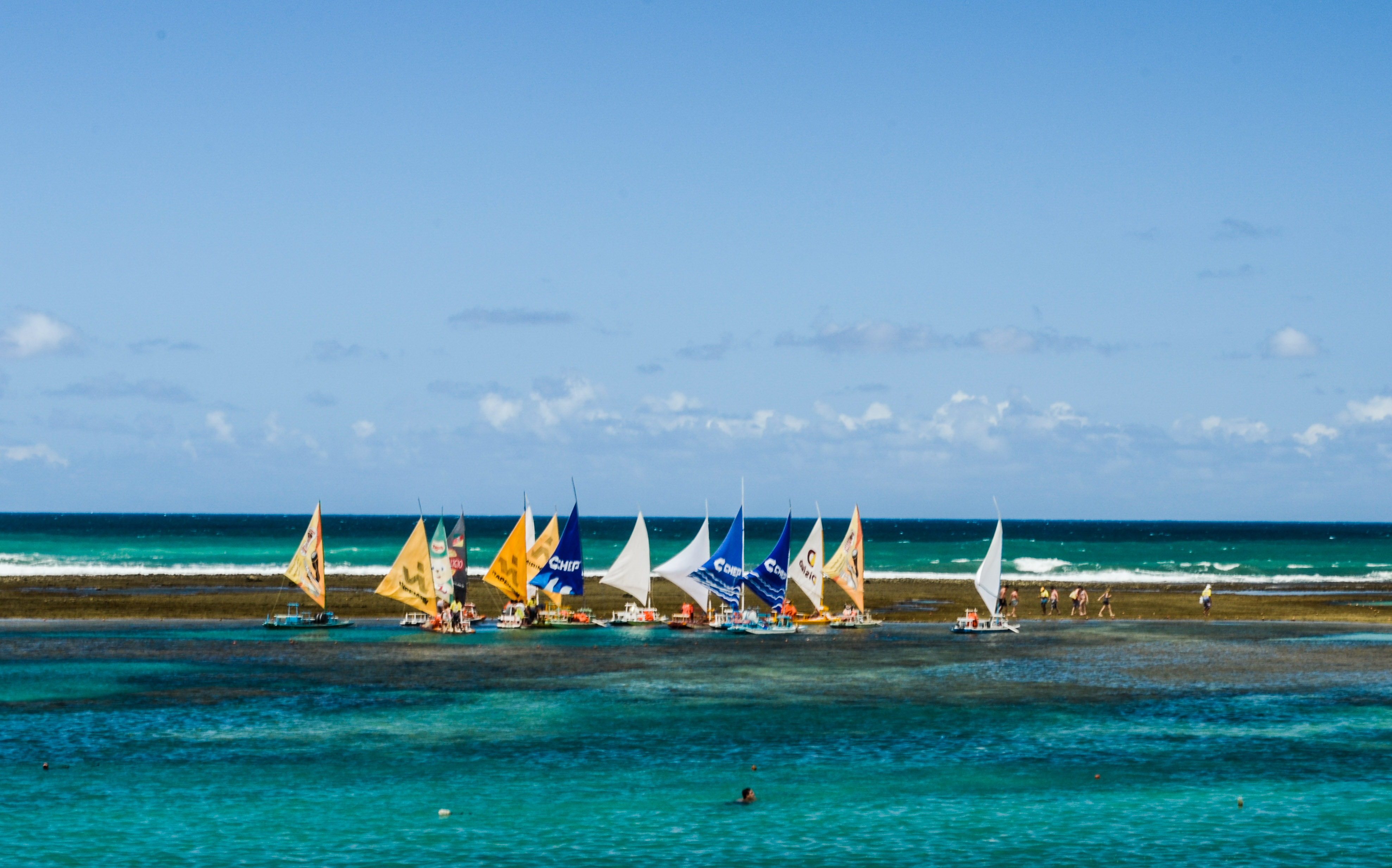 Jangadas nas piscinas naturais da praia de Porto de Galinhas.